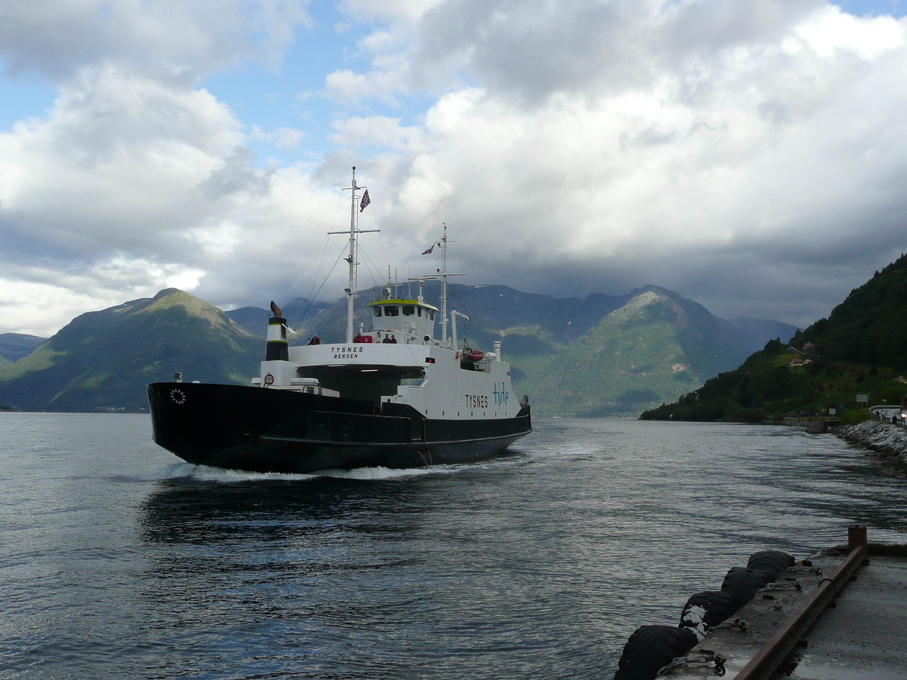 MF Tysnes ved Utne